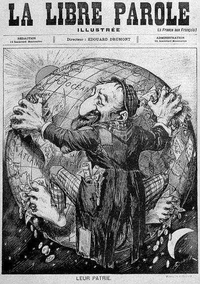 Karikatur auf der Titelseite von Edouard Drumonts „La Libre Parole” (dt. Das freie Wort; Motto: Frankreich den Franzosen!): Die ganze Welt als Vaterland der Juden ... (1893)